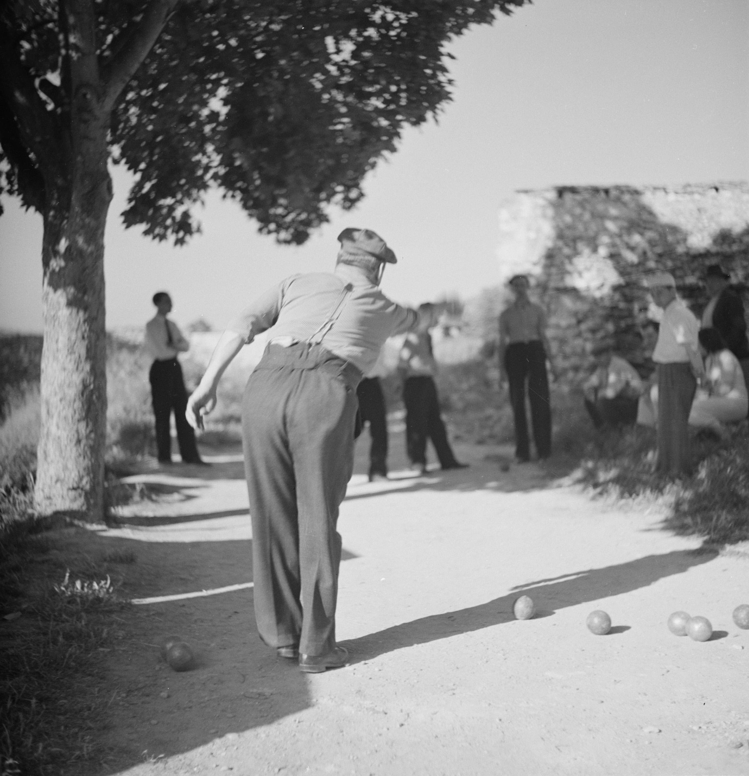 Collectie / Archief : Fotocollectie Van de Poll Reportage / Serie : Jeu de boules in Zuid-Frankrijk Beschrijving : Jeu de boules-baan met spelers, waarschijnlijk in de buurt van La Grange-Charton Régnié Datum : september 1935 Locatie : Frankrijk Trefwoorden : spelen Fotograaf : Poll, Willem van de Auteursrechthebbende : Nationaal Archief Materiaalsoort : Glasnegatief Nummer archiefinventaris : bekijk toegang 2.24.14.02 Bestanddeelnummer : 191-0339